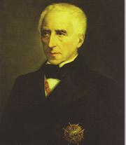 Depicted person: Claudio Antón de Luzuriaga – Spanish politician